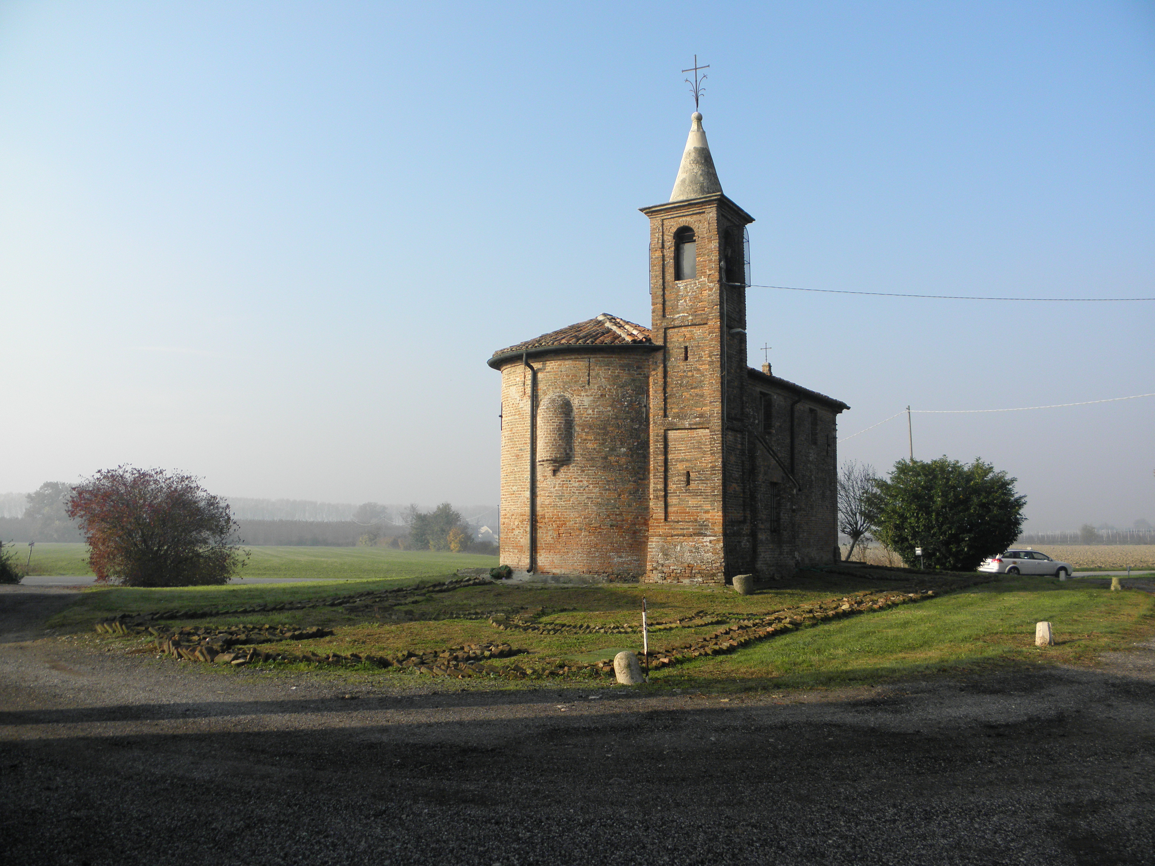 San Lorenzo, località di Quingentole: vista absidale del settecentesco oratorio dedicato alla Beata Vergine di Loreto sorto sulle fondamenta della precedente chiesa di San Lorenzo della quale sono evidenziati i perimetri delle strutture.